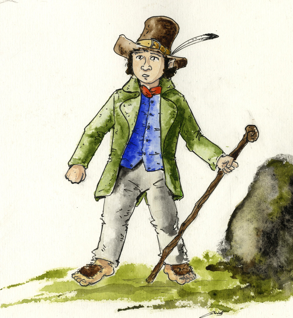 Un hobbit-Terre du Milieu